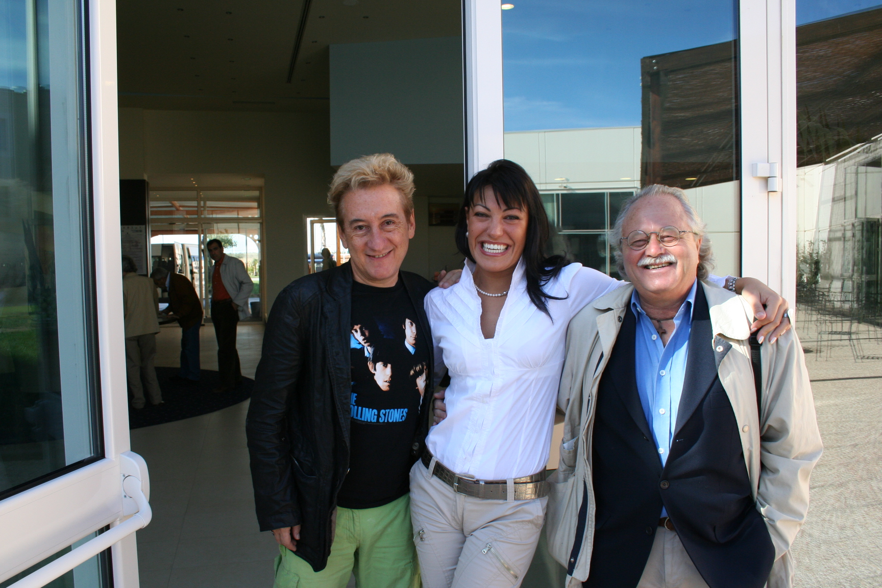 Dario Salvatori, Floriana Rignanese, Silvano Chimenti